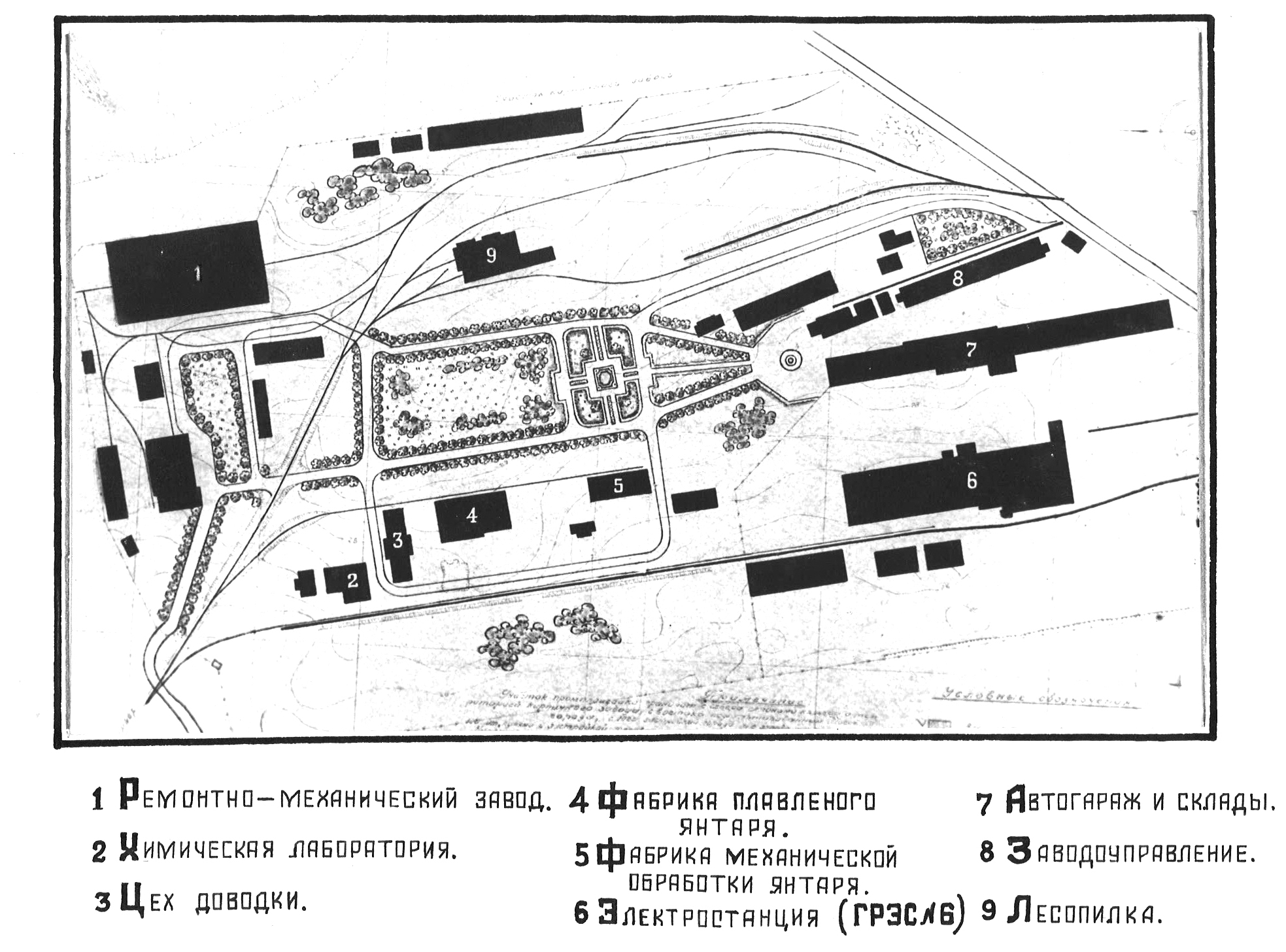 Генеральный план промышленной площадки комбината. 1950-е.